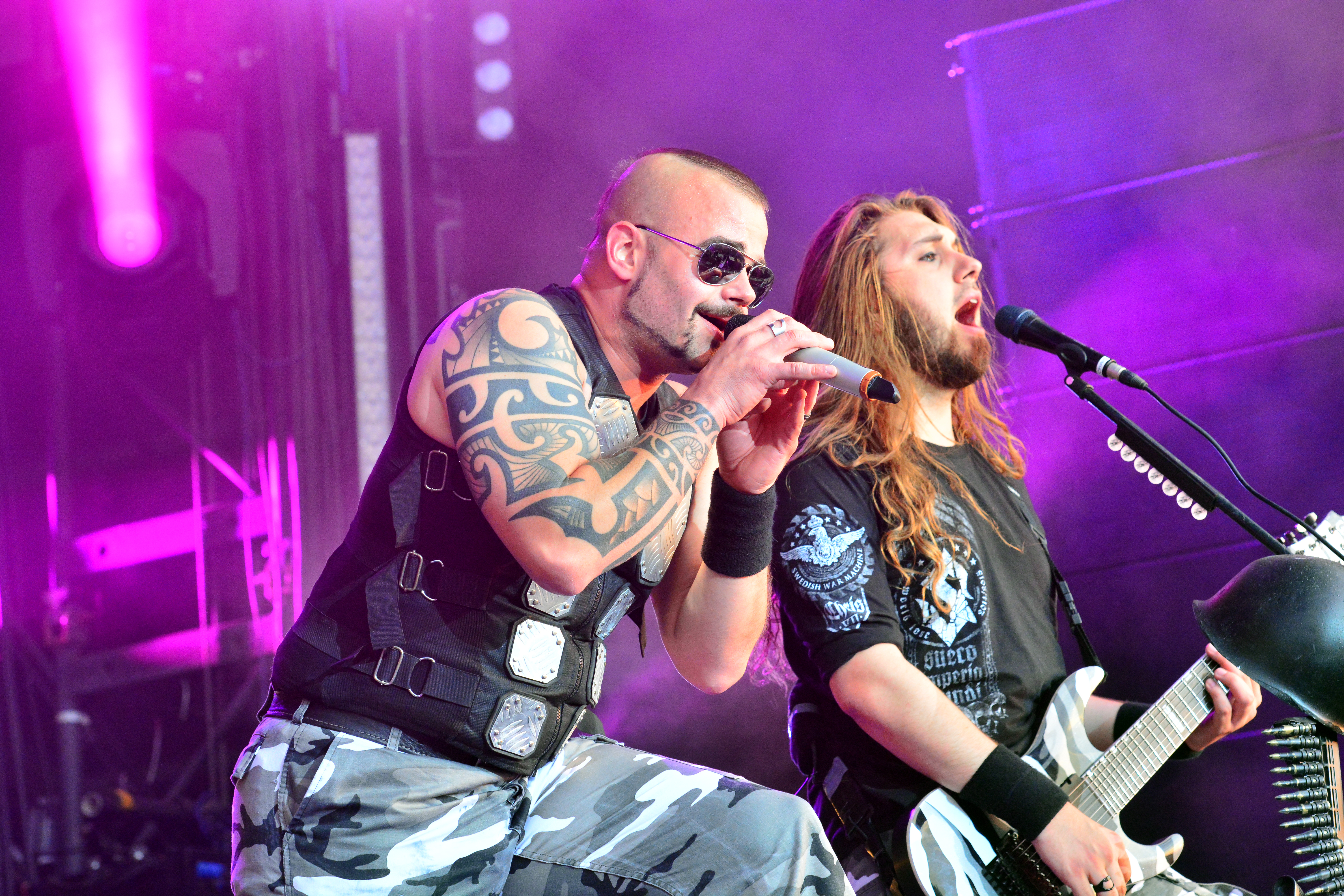 Sabaton beim Wacken Open Air 2015